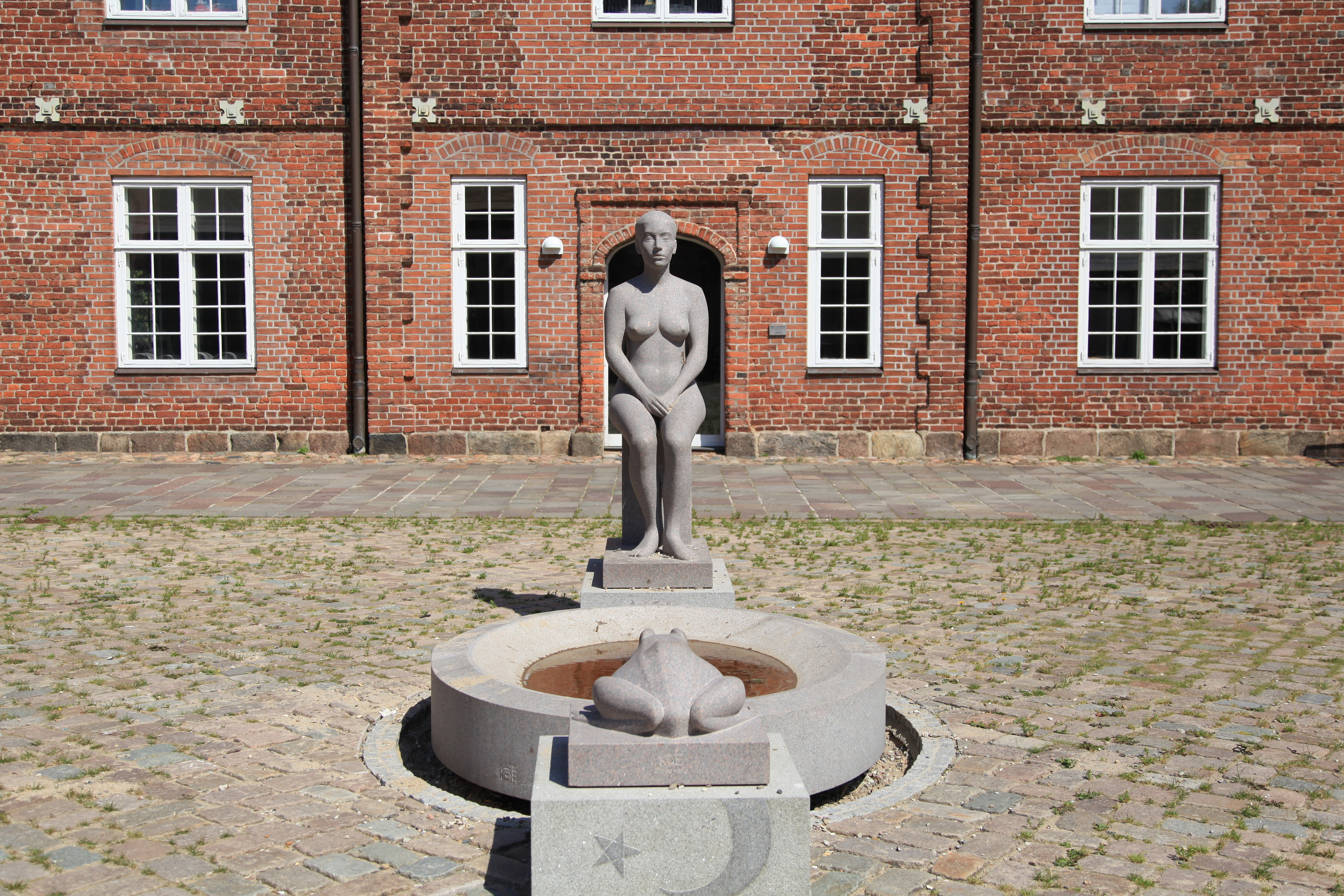 Froschkönig-Brunnen von Klaus Kütemeier im Arsenal-Innehof an der Arsenalstraße in Rendsburg